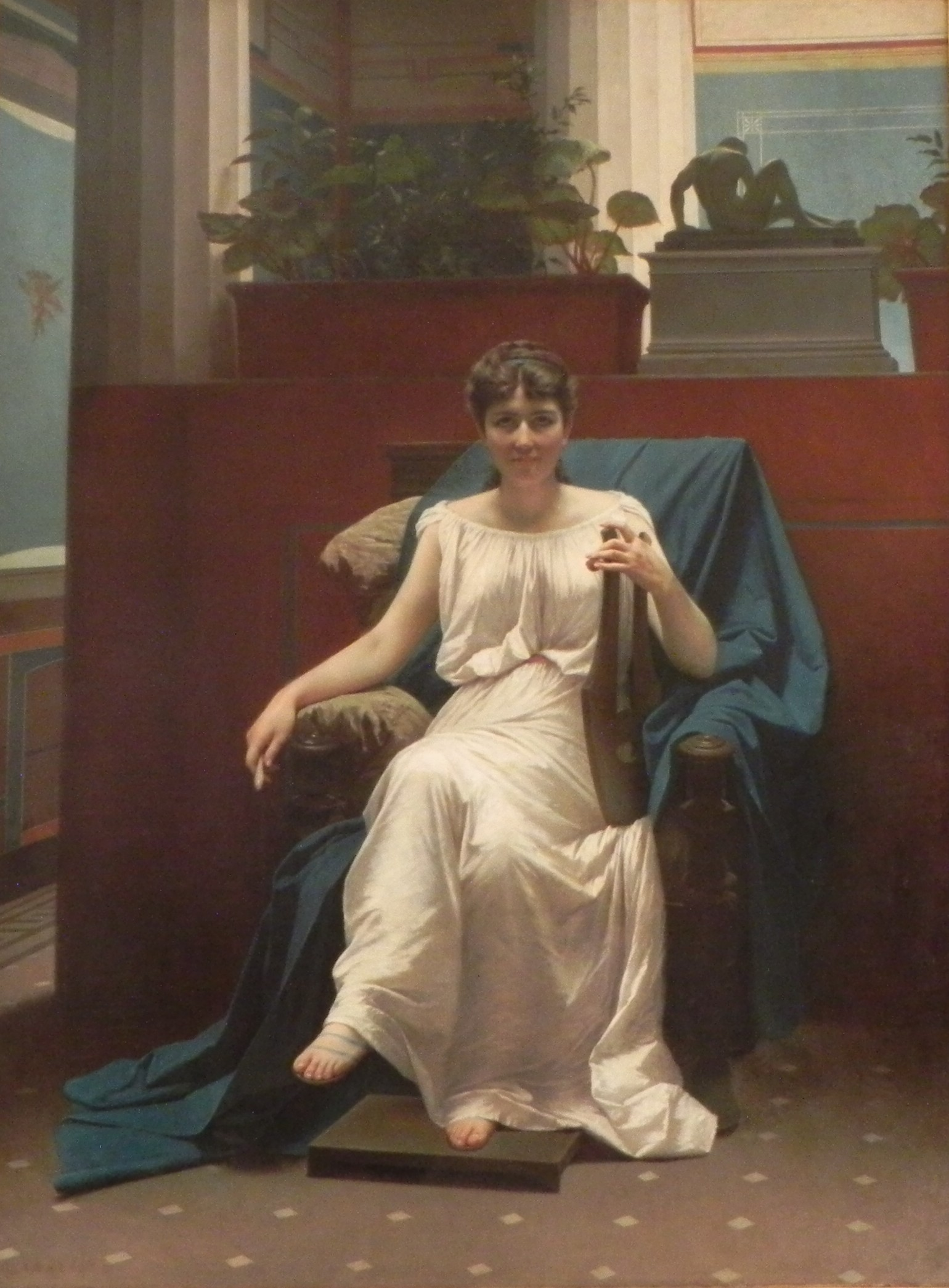 Federico Maldarelli, "In Estasi", olio su tela, firmato Fed. Maldarelli Napoli 1879, cm 157 x 206